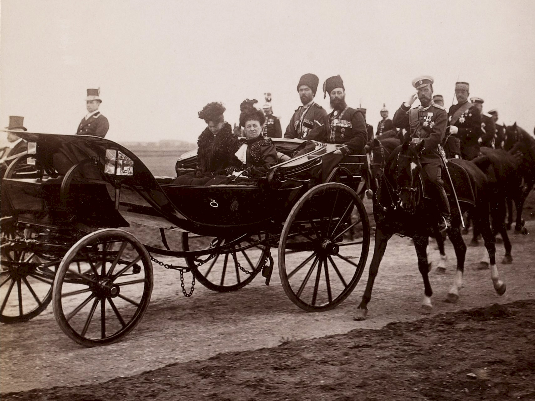 [Collection Jules Beau. Photographie sportive] : T. 14. Année 1901 / Jules Beau : F. 44. Tzar à la revue de Bétheny ; ébarbeuse de pavés de bois